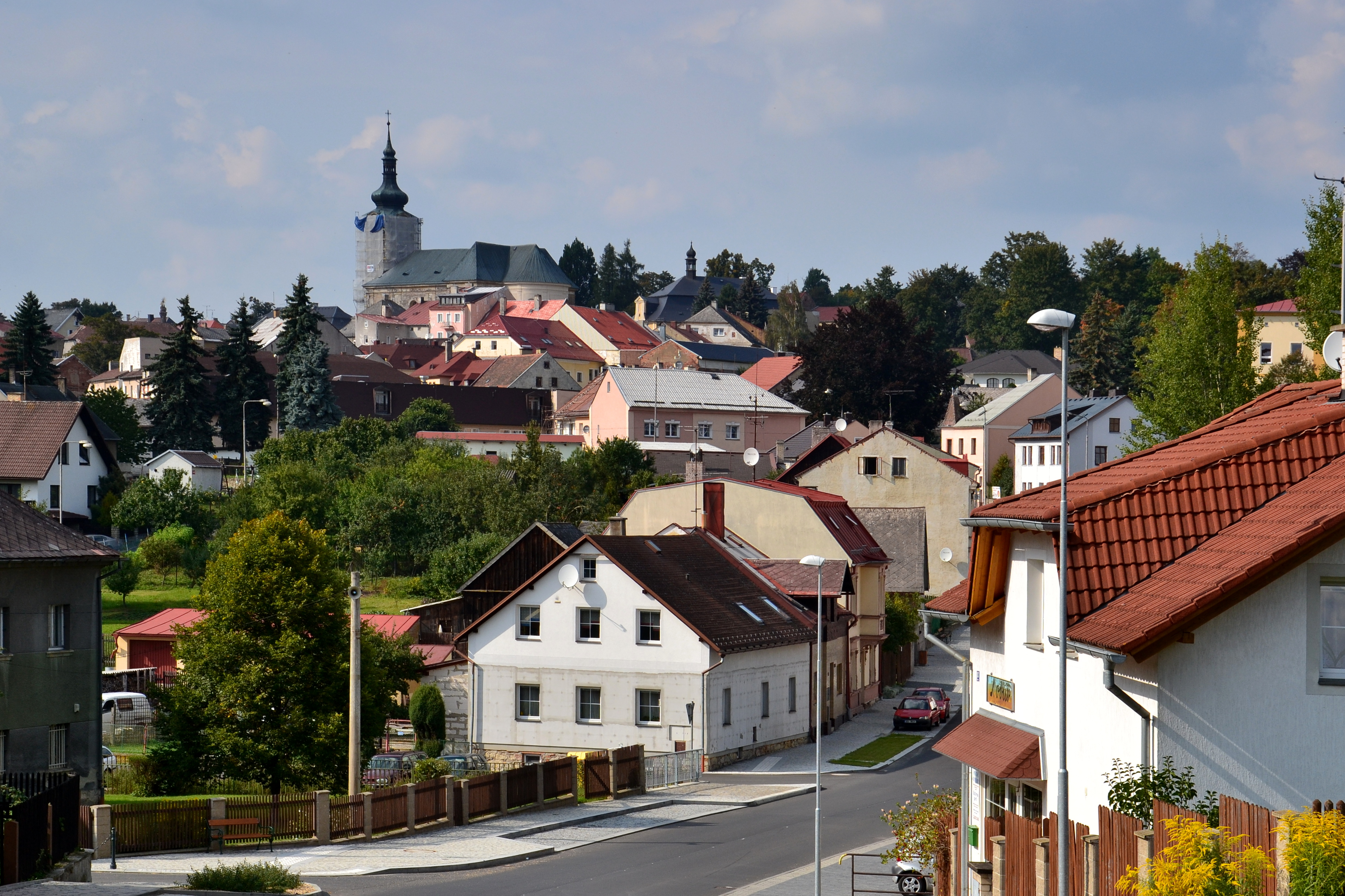 Celkový pohled na město z jihovýchodu